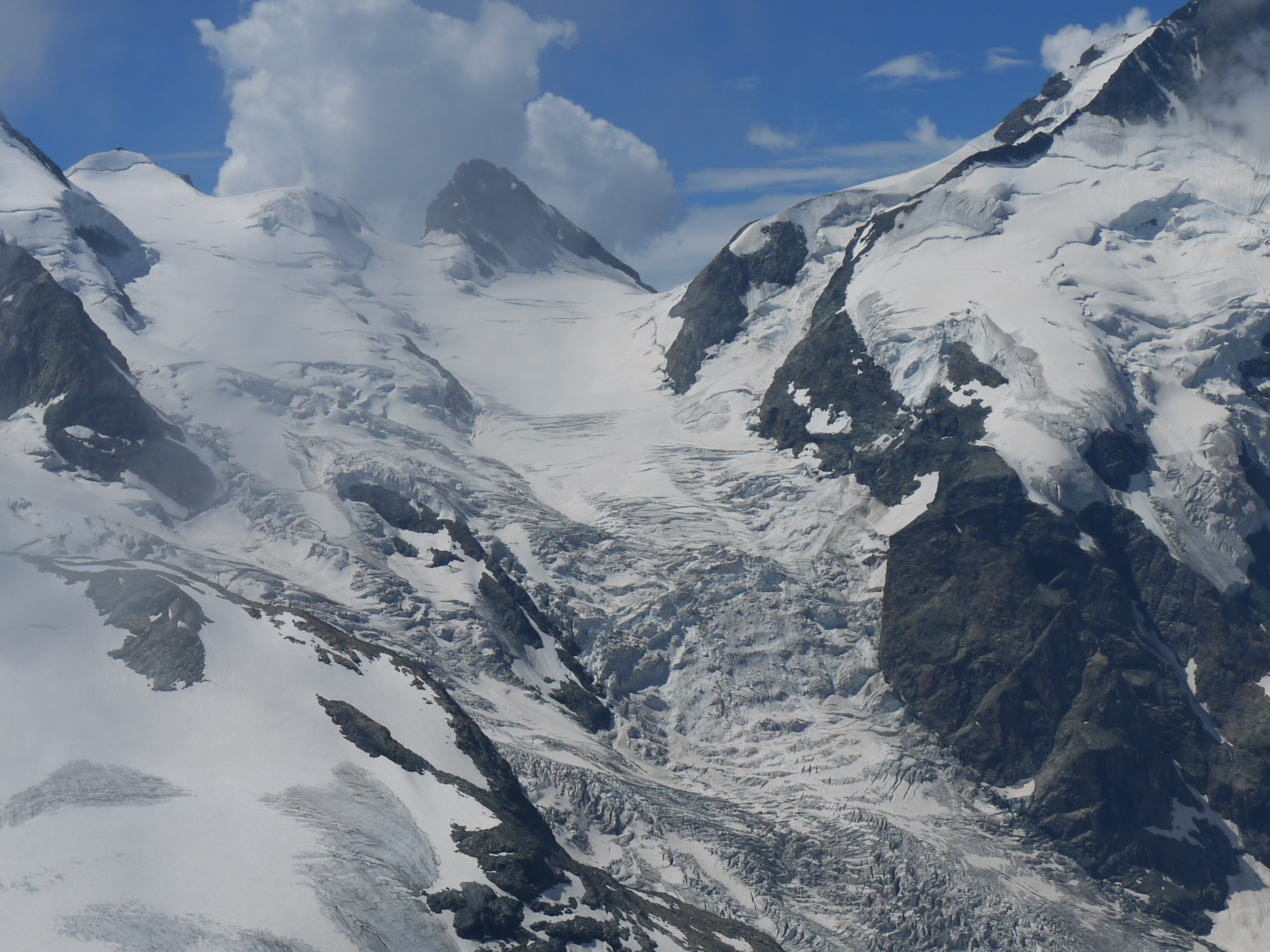 Piz Bernina (4049m) Nordflanke (rechts) mit Morteratschgletscher